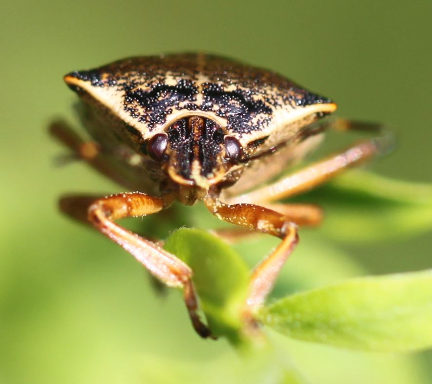 Baumwanze Pinthaeus sanguinipes an Besenginster am 6. Juni 2018 in der Schwetzinger Hardt